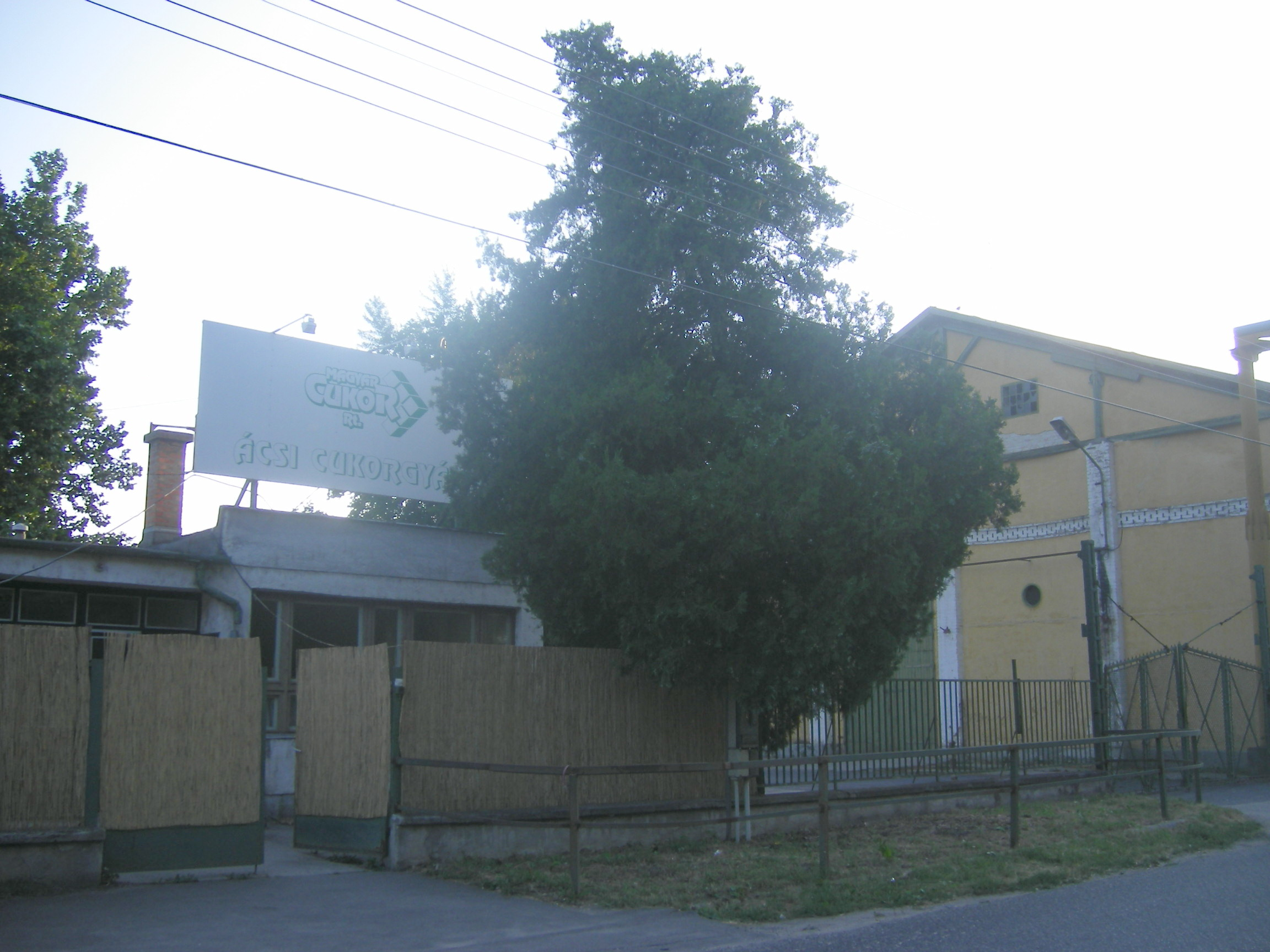 Ács - volt cukorgyár